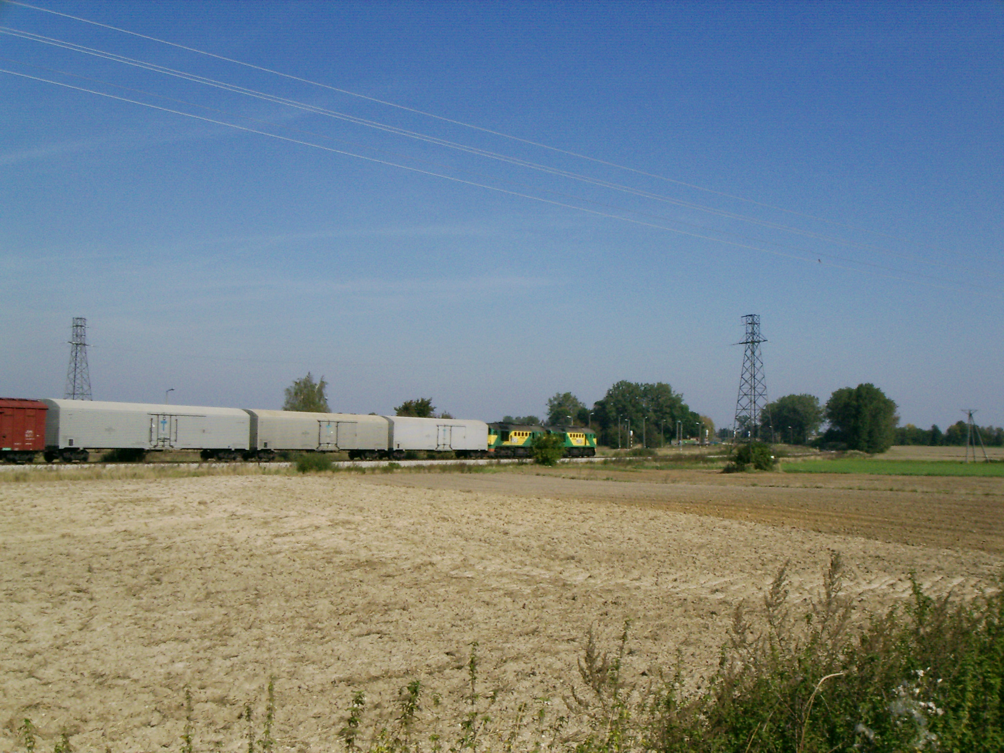 Zawada (powiat zamojski)